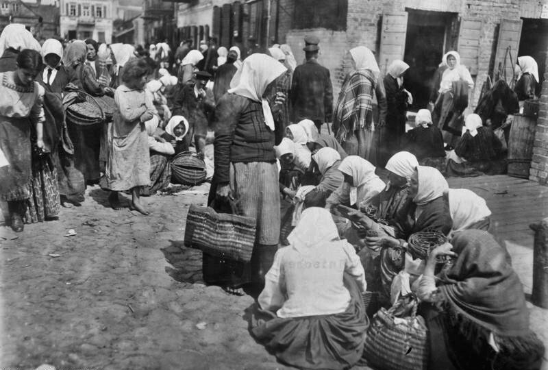 Strassenbild von Lida. Polnische Landleute auf dem Markte. Aufgenommen Mitte Juli